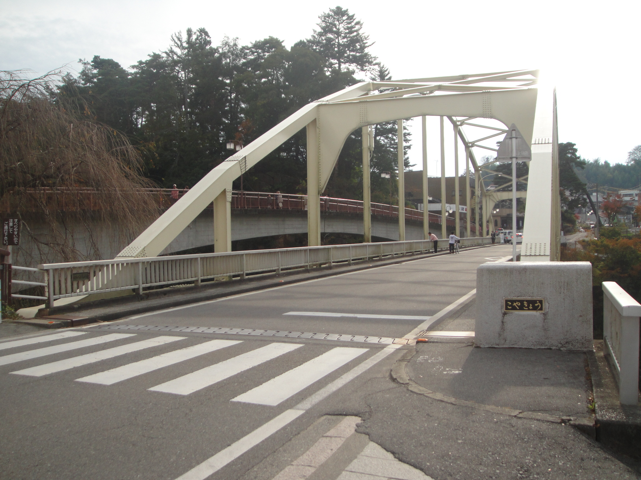 長野県道492号天竜峡停車場下平線の姑射橋。